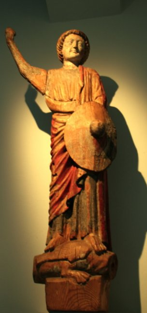 Archengel Michael wood ca 1200 in Bergen Museum, Processing by John Erling Blad